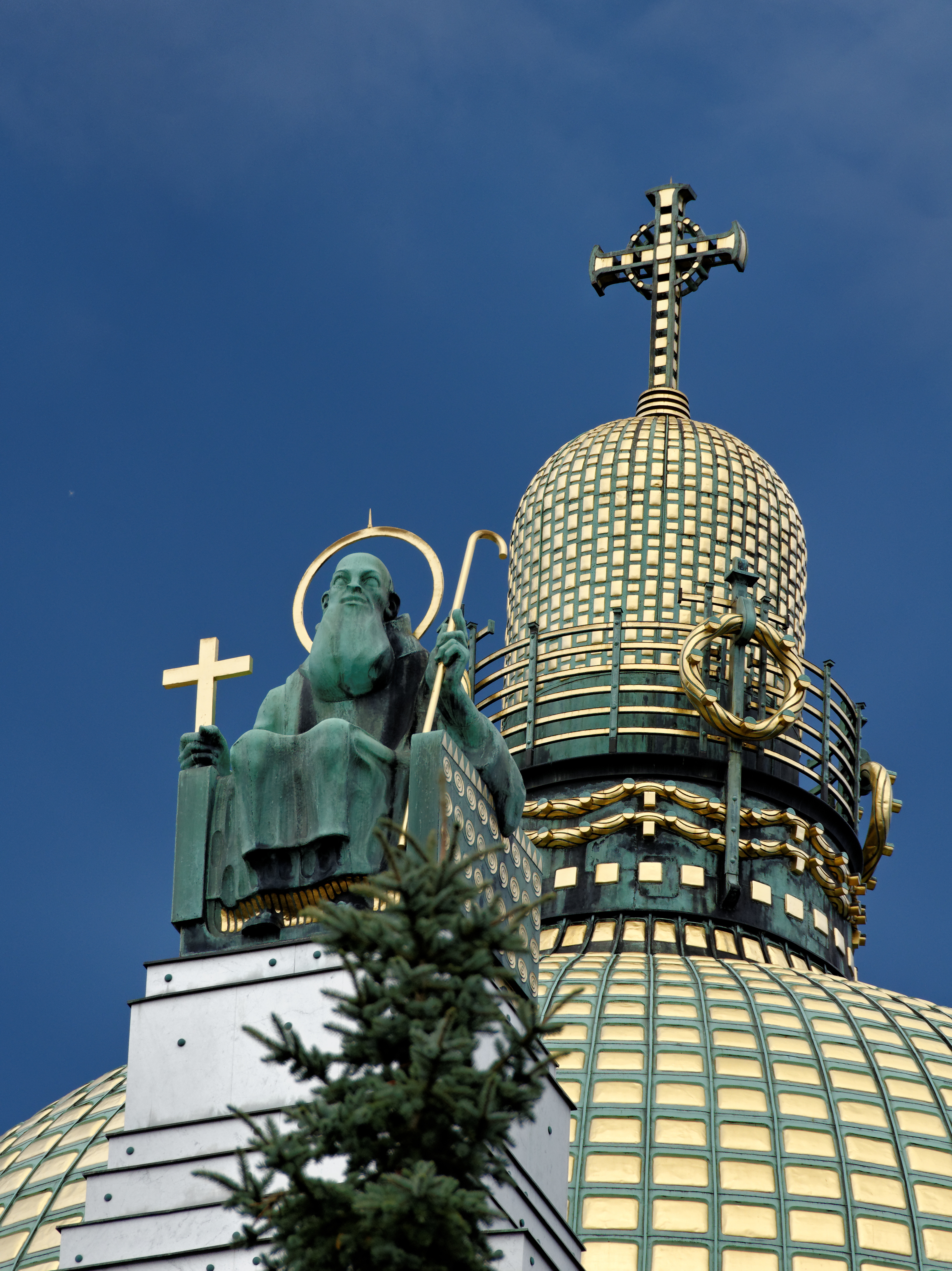 Saint Léopold (Léopold III d'Autriche), Kirche am Steinhof, Vienne (Autriche). Église construite par Otto Wagner entre 1902 et 1907. Sur les deux clochetons encadrant la façade, des saints (Léopold à droite, Séverin à gauche) par Richard Luksch occupent des sièges dessinés par Josef Hoffmann